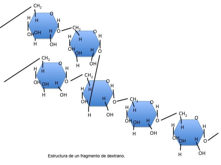 Estructura molecular fragmento dextrano